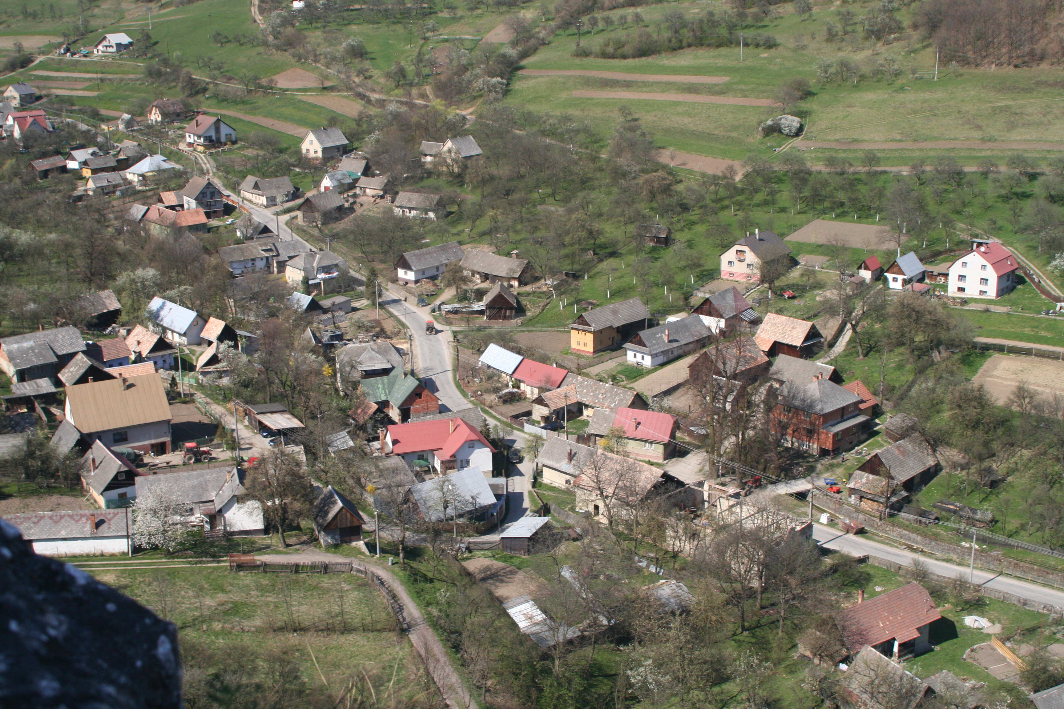 Česky: Střední část obce Lednica